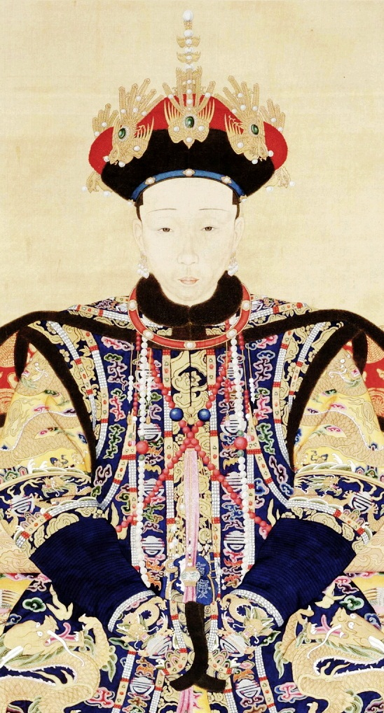 清 佚名 《清高宗乾隆孝仪纯皇后朝服像》